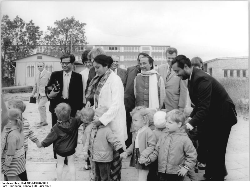 LPG Dedelow, Delegation aus Bangladesch ADN-ZB Bartocha 20.6.1973 Bez.Neubrandenburg: Awami-Liga-Delegation besuchte LPG-Die Delegation der Awami-Liga der VR Bangladesh besuchte am 20.6.73 die LPG Dedelow im Kreis Prenzlau. Im Hintergrund Mitte: Der Leiter der Delegation, Generalsekretär der Awami-Liga, Zillur Rahman. (siehe ADN-Meldung)